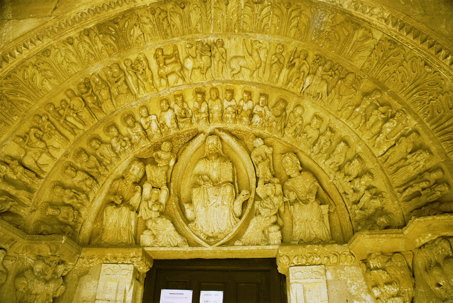 Tímpano de la Iglesia de San Esteban en Moradillo de Sedano, Burgos (España), sXII.